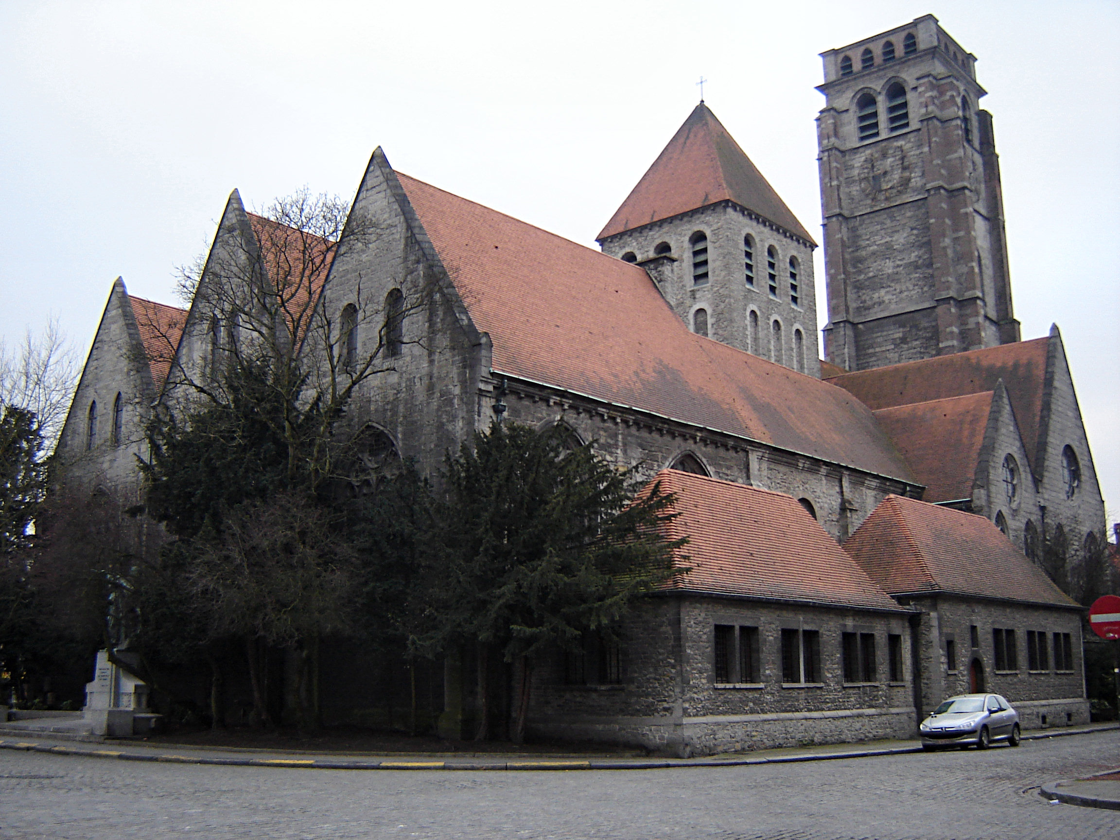 Eglise Saint-Brice in Tournai, Hainaut, Belgium